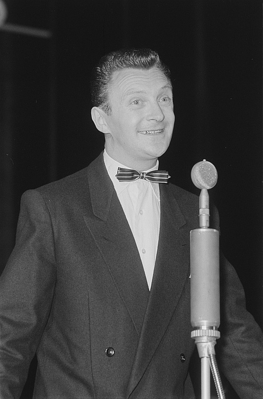 Original image description from the Deutsche FotothekFips Fleischer bei der Festivität zum 60jährigen Bestehen der Leipziger Volkszeitung